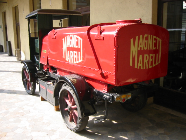 Oeuvre du Musée des sciences & technologies Léonard de Vinci de Milan - Italie